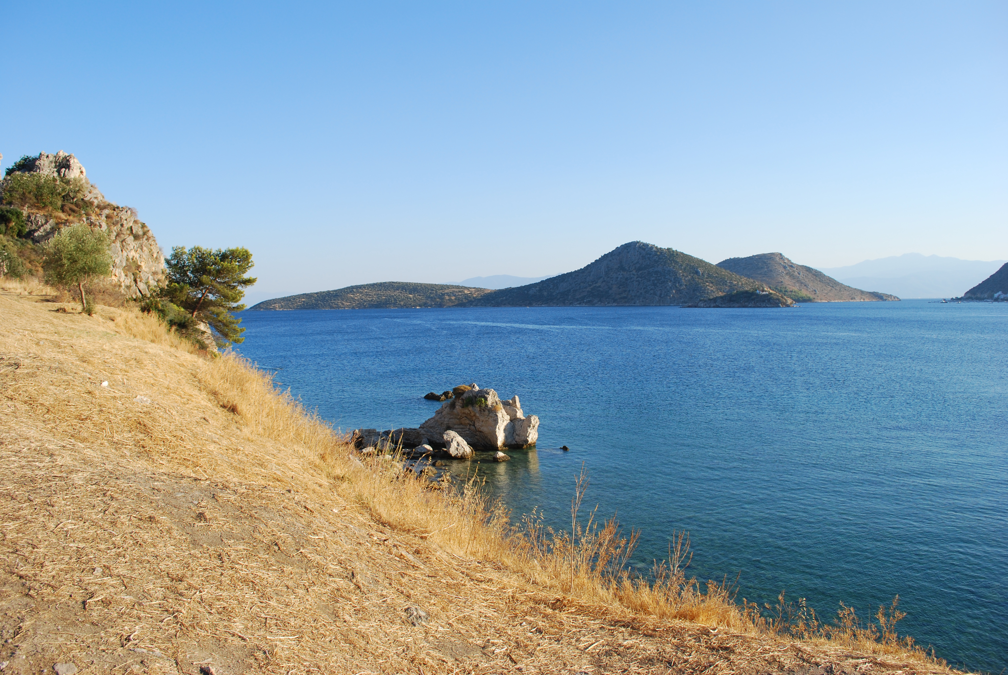 Asiné : promontoire et vue sur la baie de Tolo (Koronisi et Romvi) dans le Golfe Argolique.